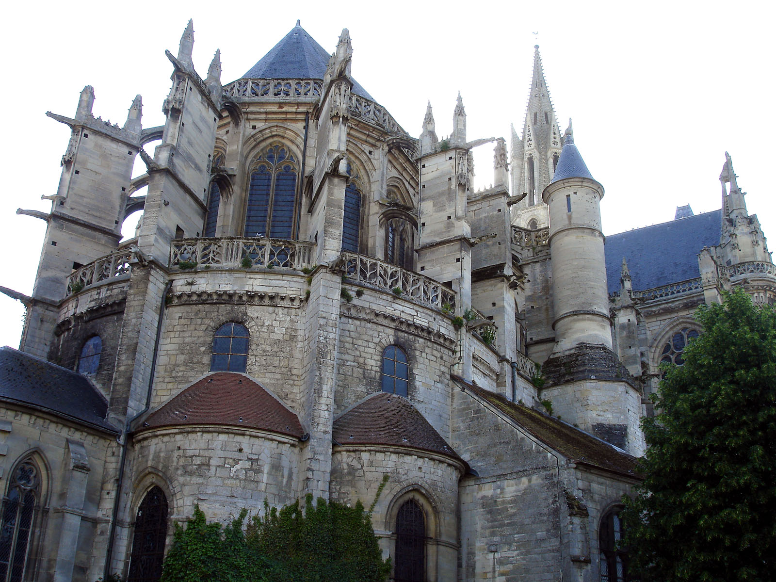 Chevet de la cathédrale Notre-Dame de Senlis, Oise, France.